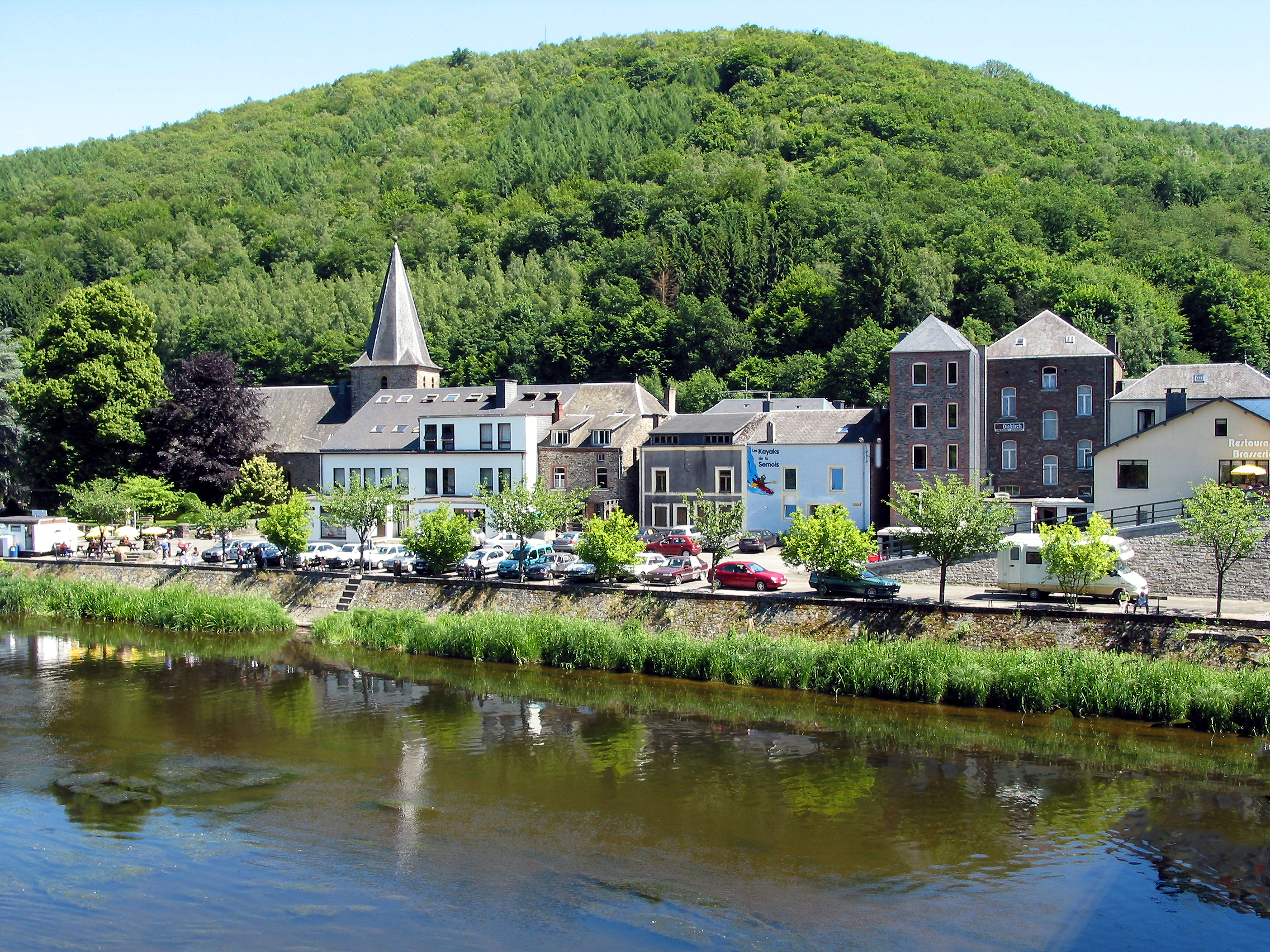 Bohan (Belgique), le village vu du pont sur la Semois.